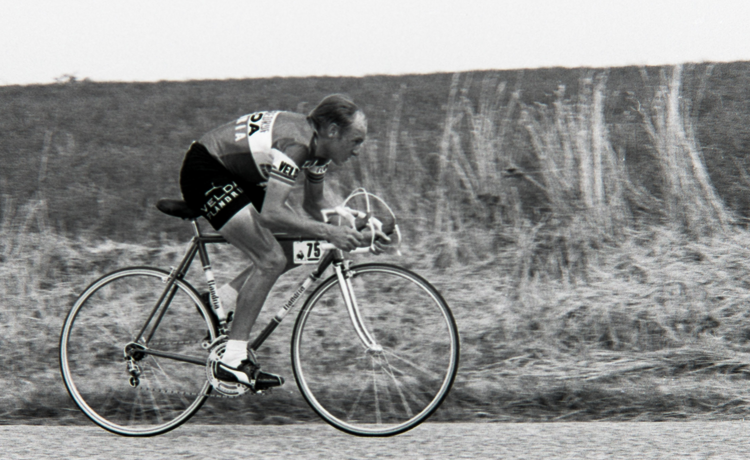 Michel Pollentier durant le Tour de France 1976. Photographie : René Milanese